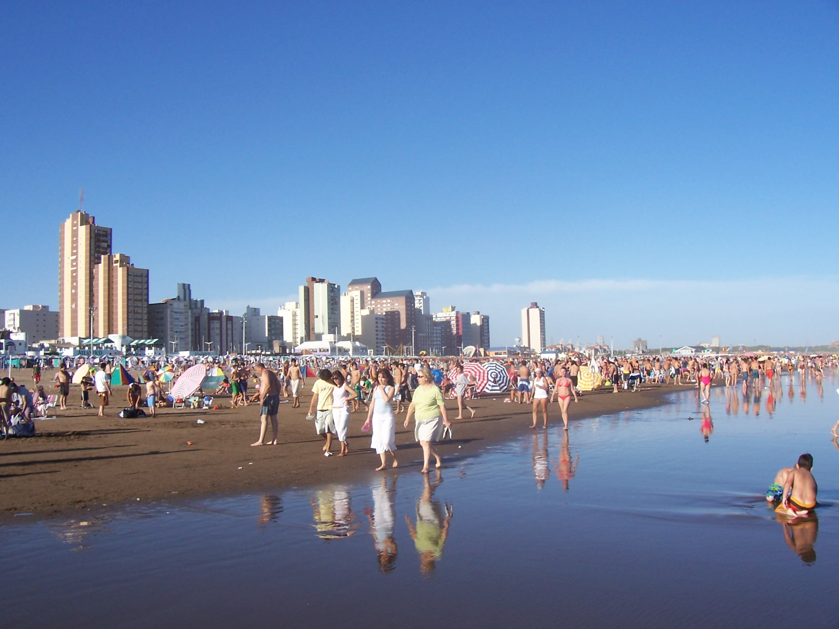 La playa de la ciudad bonaerense de Necochea.